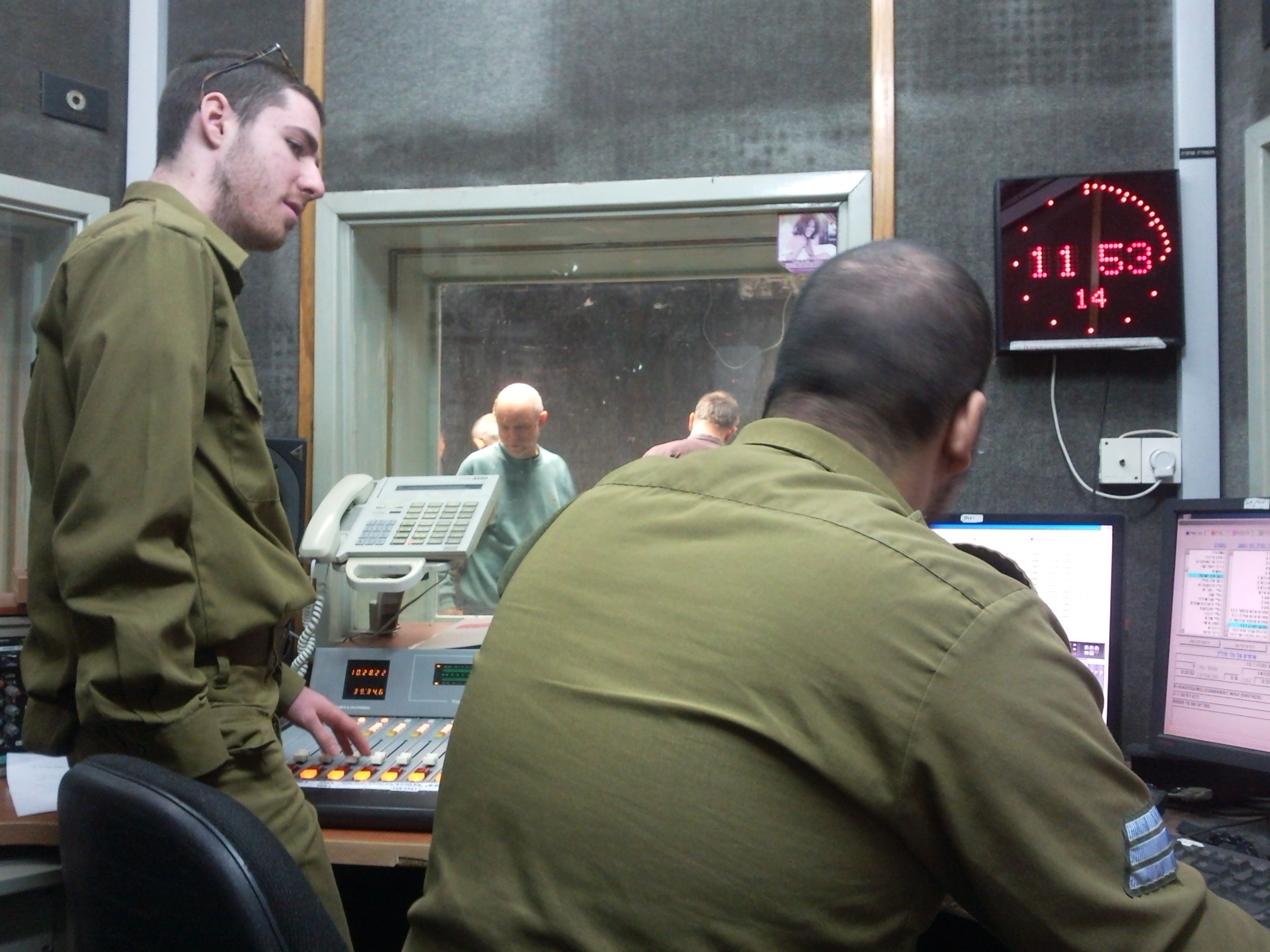 אולפן גלי צה"ל